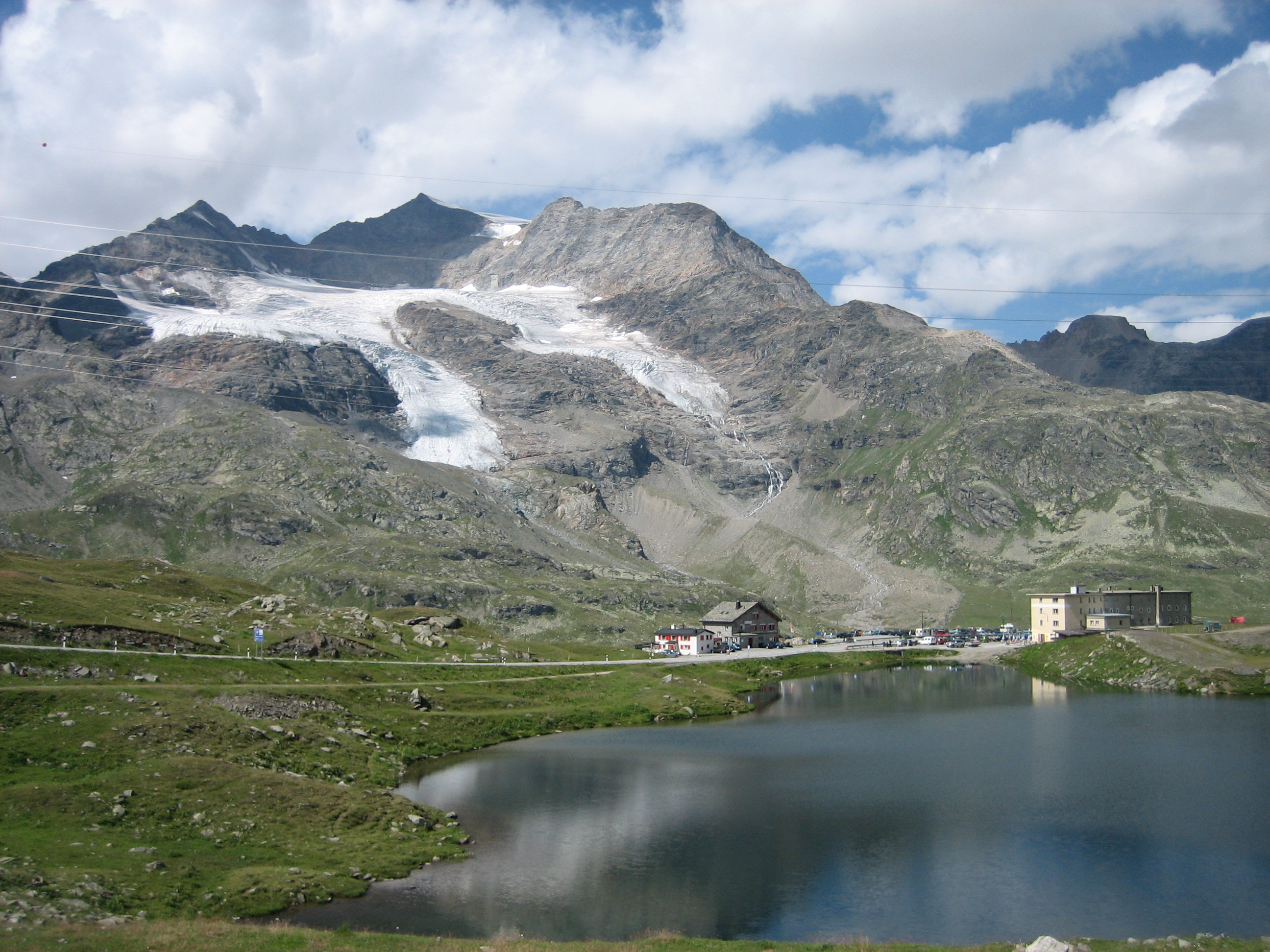 Hospiz auf dem Berninapass, im Hintergrund Piz Cambrena und der Cambrenagletscher